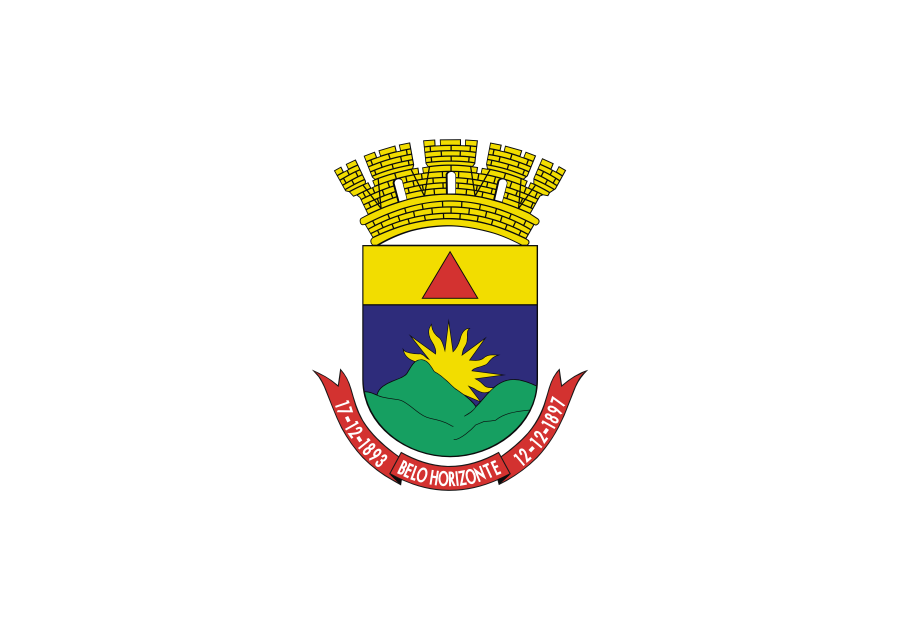 Bandeira da capital Belo Horizonte, Minas Gerais, Brasil / Flag of Minas Gerais´s capital, Brasil